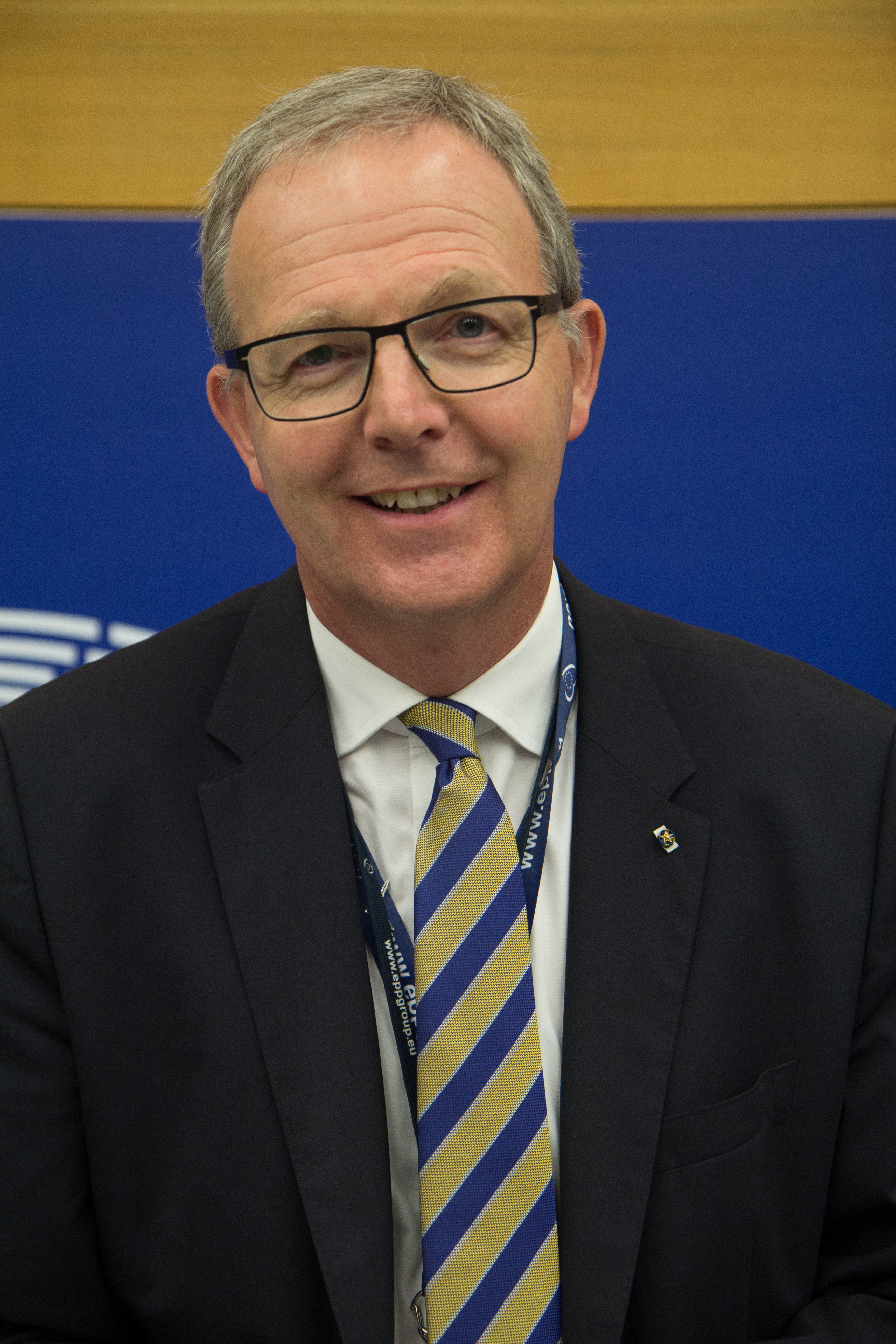 Sitzung des Europa Parlaments im Juli 2018 in Straßburg.